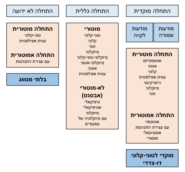 סיווג התקפי אפילפסיה לפי ה-ILAE